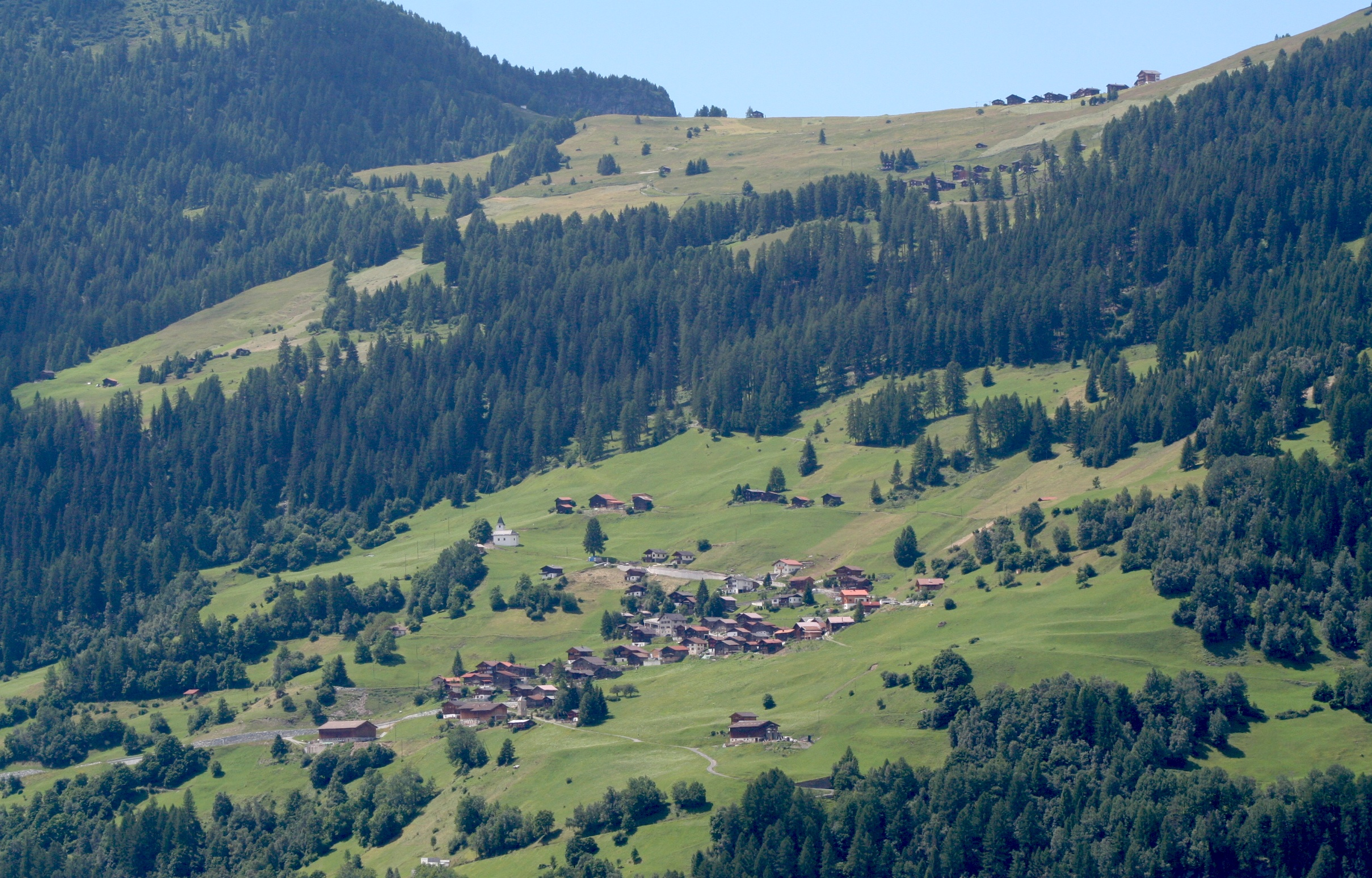 Mutten